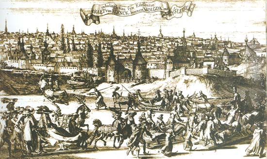 Въезд голландского посла Конрада ван Кленка в Вологду. Голландская гравюра. 1675 год